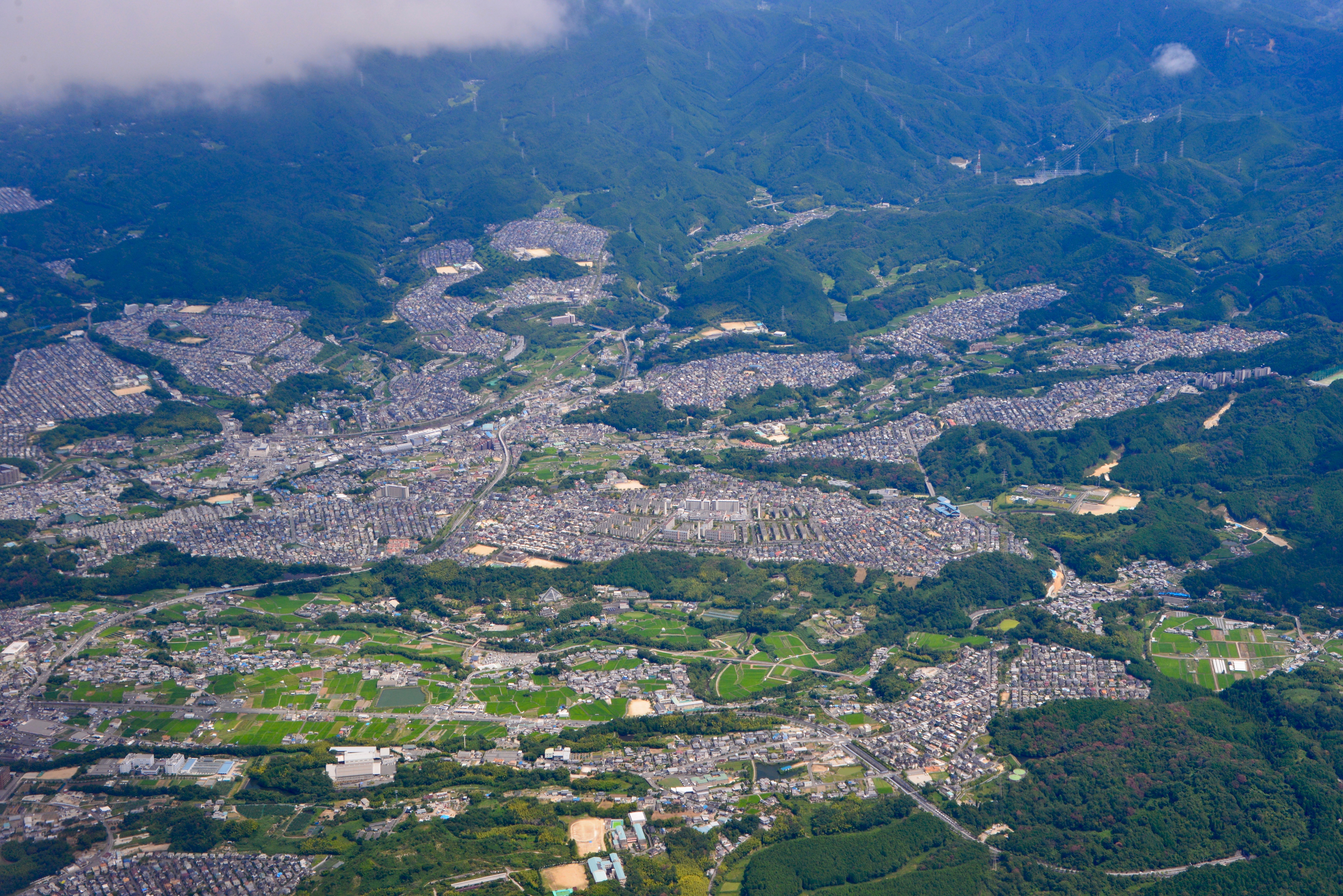 河内長野市のニュータウン。伊丹空港へ向かう機内より撮影